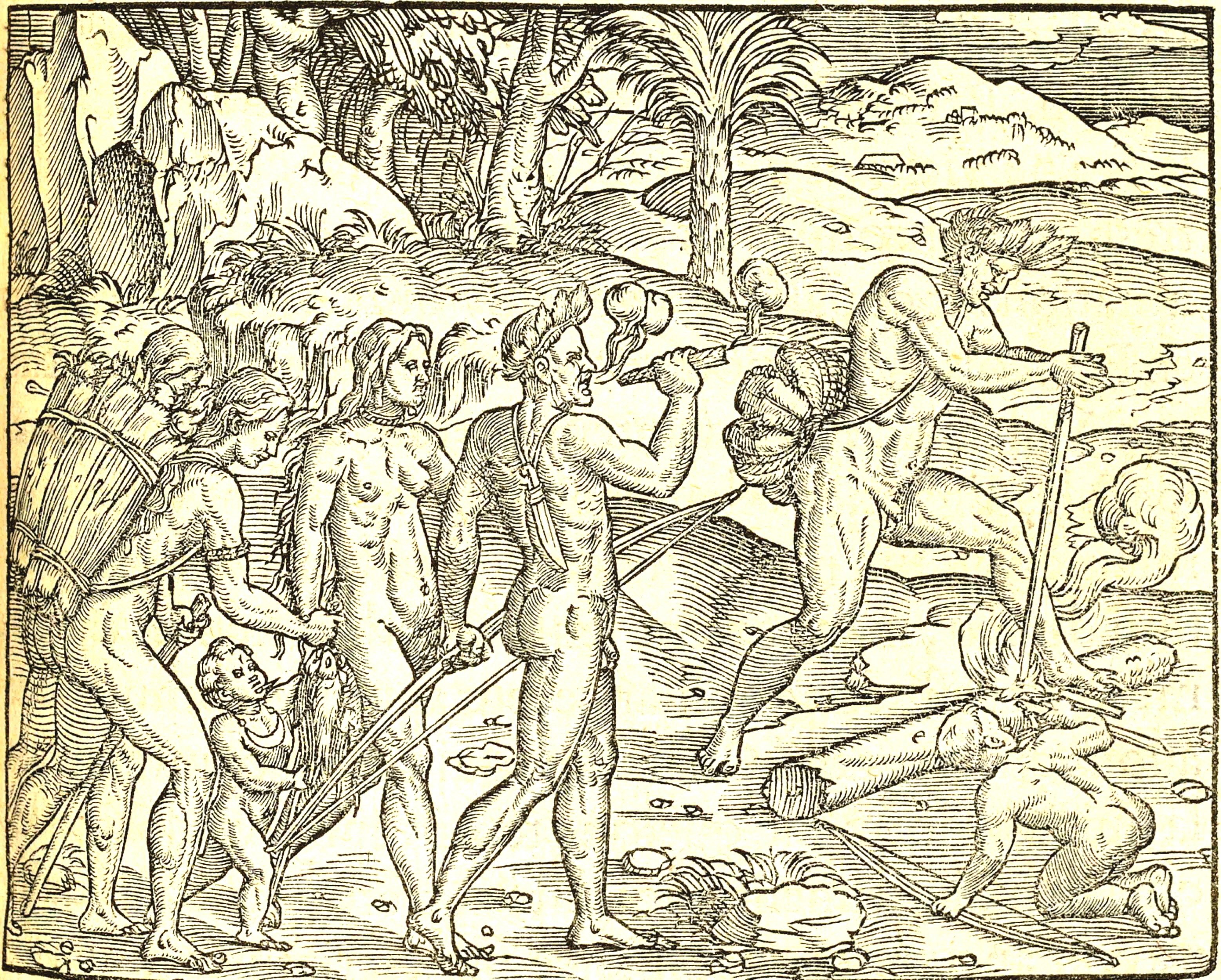 Les singularitez de la France Antarctique, autrement nommée Amerique: & de plusieurs Terres & Isles decouvertes de nostre temps. Paris: for the heirs of Maurice de la Porte, 1558